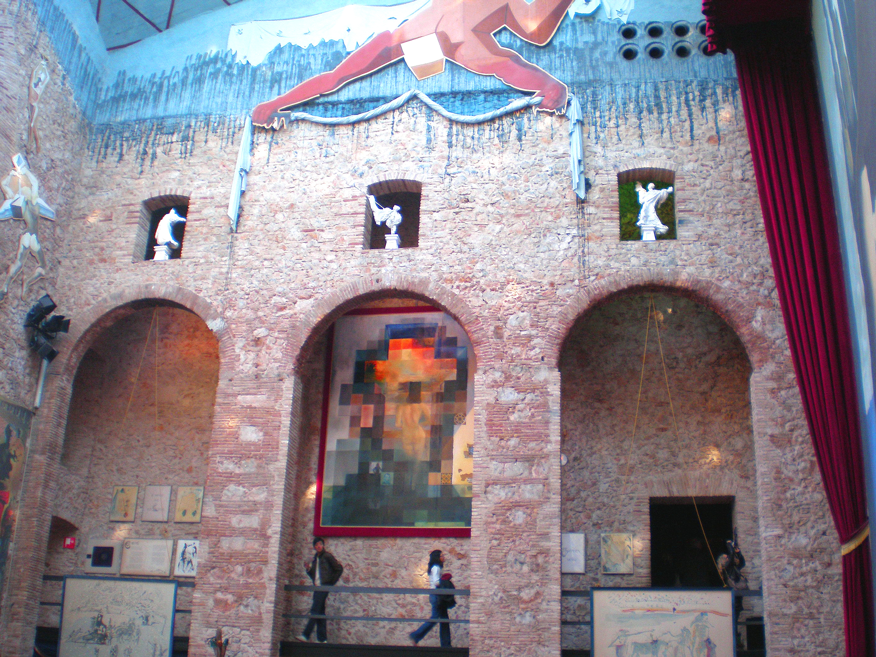 Lateral izquierdo del escenario del Teatro-Museo Dalí de Figueres, Girona.